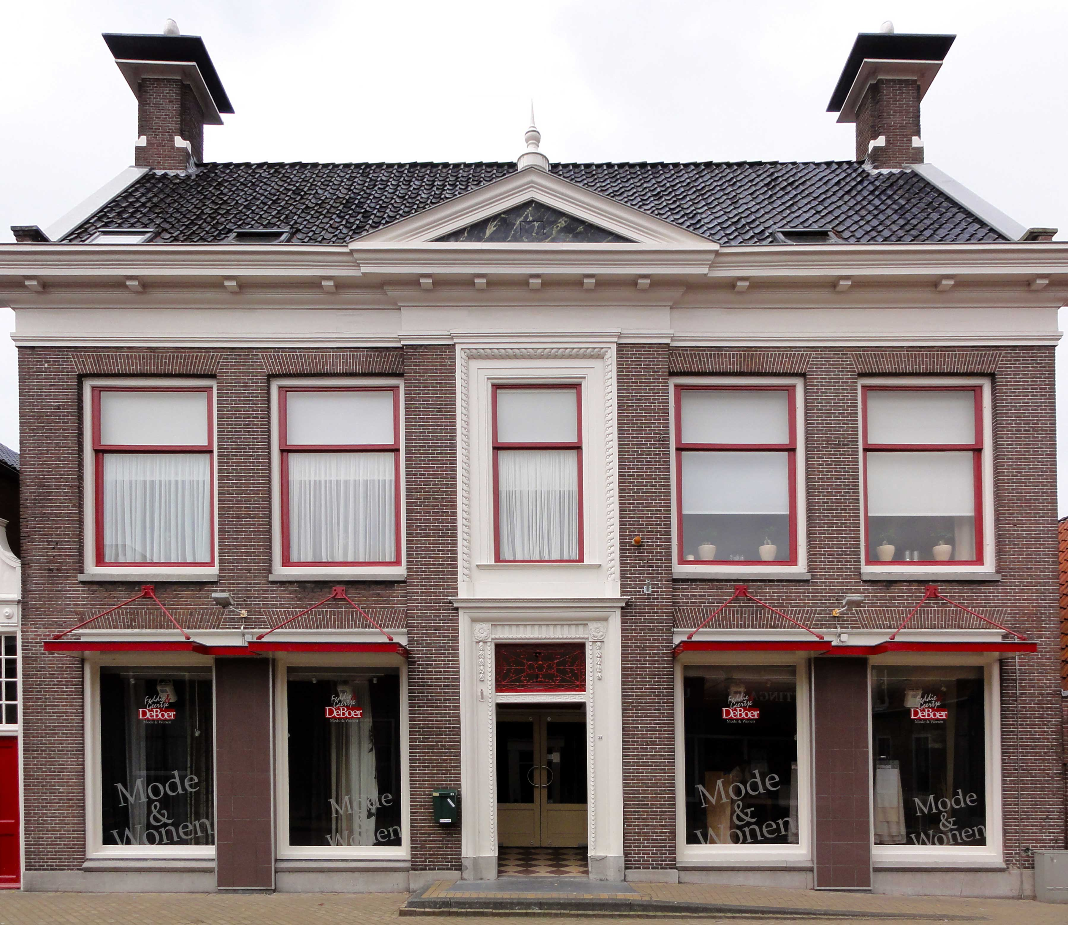 Kerkstraat 35 te Makkum